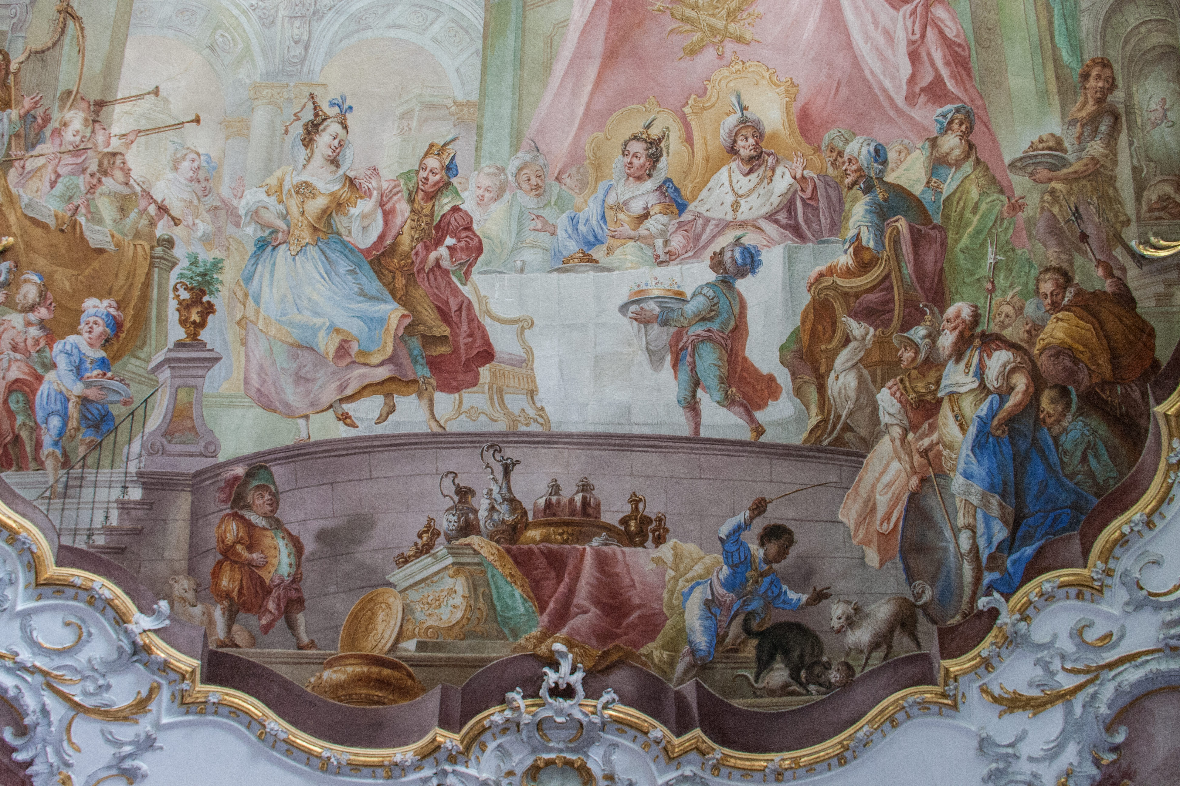 Pfarrhaus in Zaisertshofen; Ausschnitt des Hauptfreskos im Tafelzimmer